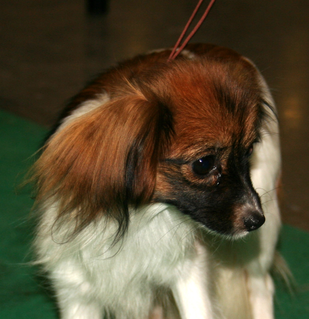 Spaniel_miniaturowy_kontynentalny_phalene na Światowej Wystawie Psów Rasowych w Poznaniu